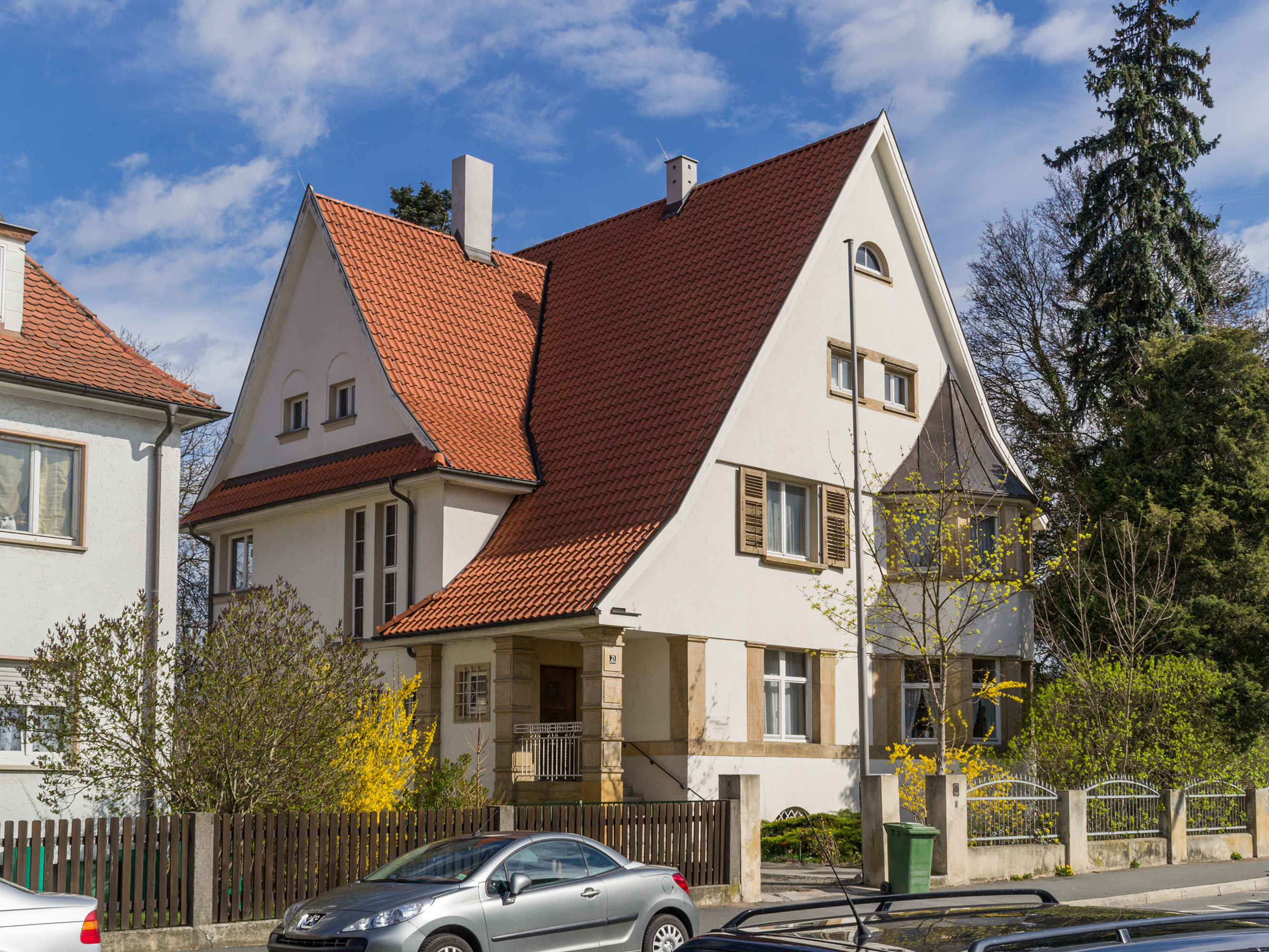 „Sonnenhaus“ der Familie Otto Bamberger, Baujahr 1914, errichtet durch Architekt August Berger (Hildburghausen) in der Kronacher Straße 19 (ab 1937: Adolf-Hitler-Straße 21, heute Kronacher Straße 21) in Lichtenfels, Oberfranken. Das Interieur der Villa wurde 1928 durch Bauhaus-Designer Erich Dieckmann komplett neu gestaltet und ausgestattet. 1933 „Schutzhaft“ des Hausherrn Otto Bamberger (1885–1933) in Frankfurt am Main als jüdischer Unternehmer und SPD-Mitglied, Verhör, kurz danach verstorben. 1938 Flucht der Witwe Henriette „Jetta“ Bamberger (1886–1978), geborene Wolf, in die USA. Ausstattung während der „Reichskristallnacht“ durch Lichtenfelser Nationalsozialisten teils zerstört (niederländischer Kachelofen) und hunderte Bücher aus der Bibliothek auf die Straße geworfen. Namhafte und umfangreiche Kunstsammlung hunderter Werke (z. B. Ernst Barlach, Max Beckmann, Marc Chagall, Lovis Corinth, Otto Dix, Paul Klee, Oskar Kokoschka, Käthe Kollwitz, Alfred Kubin, Franz Marc und Emil Nolde) als „entartet“ klassifiziert und beschlagnahmt und nie zurückerstattet.